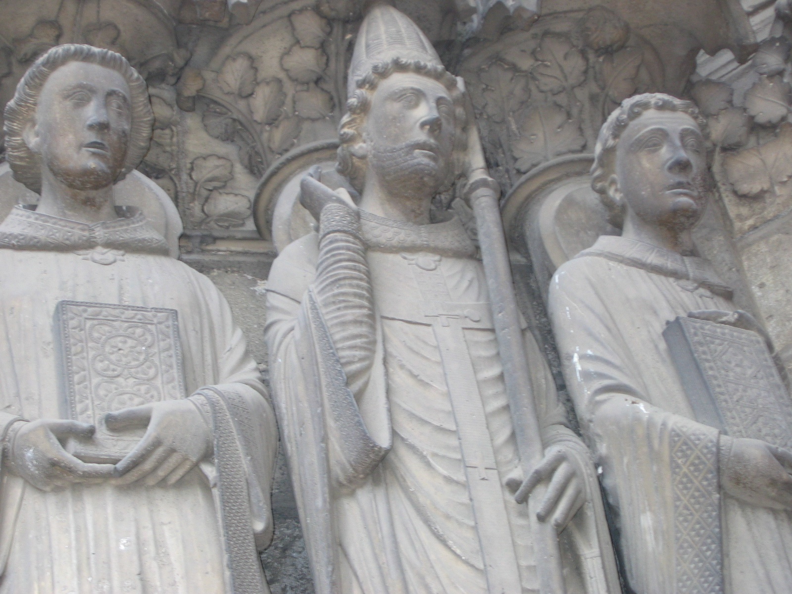 Porche Sud de la cathédrale de Chartres, portail de gauche, personnages à gauche du tympan